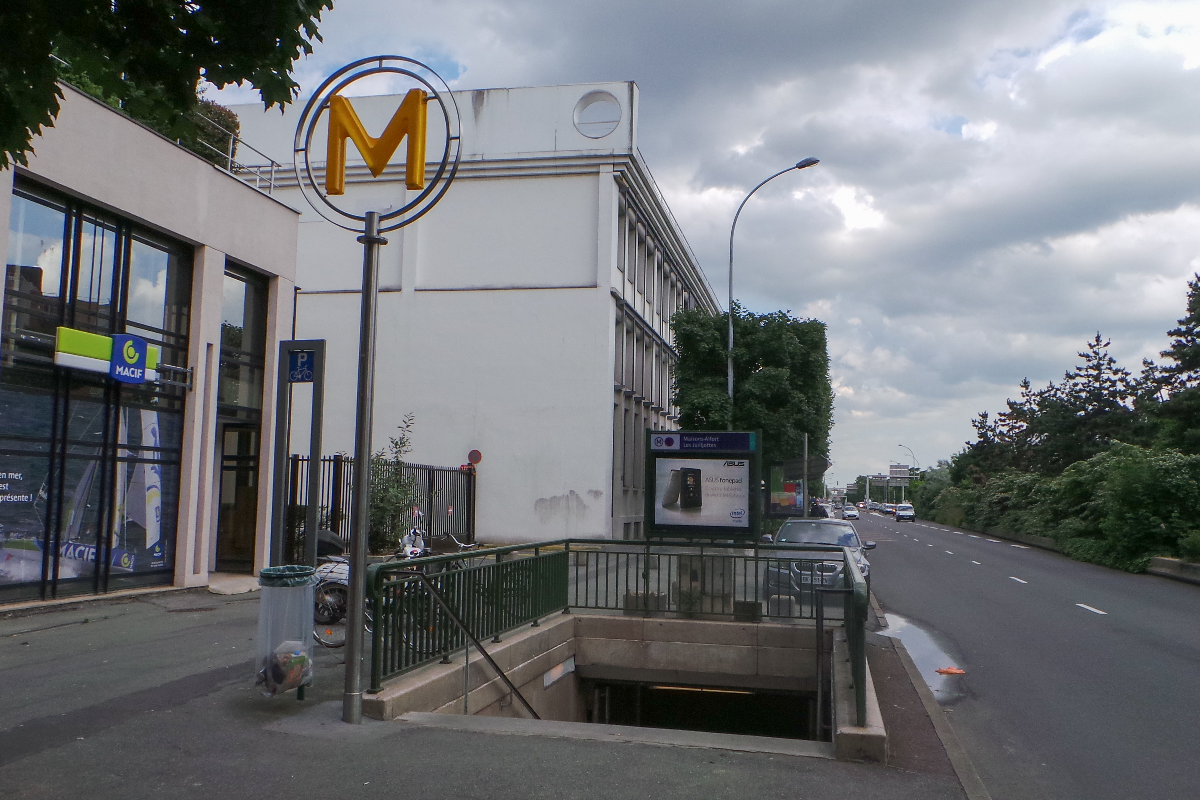 Station de métro Maisons-Alfort - Les Juilliottes, métro de Paris ligne 8, Maisons-Alfort, Val-de-Marne, France